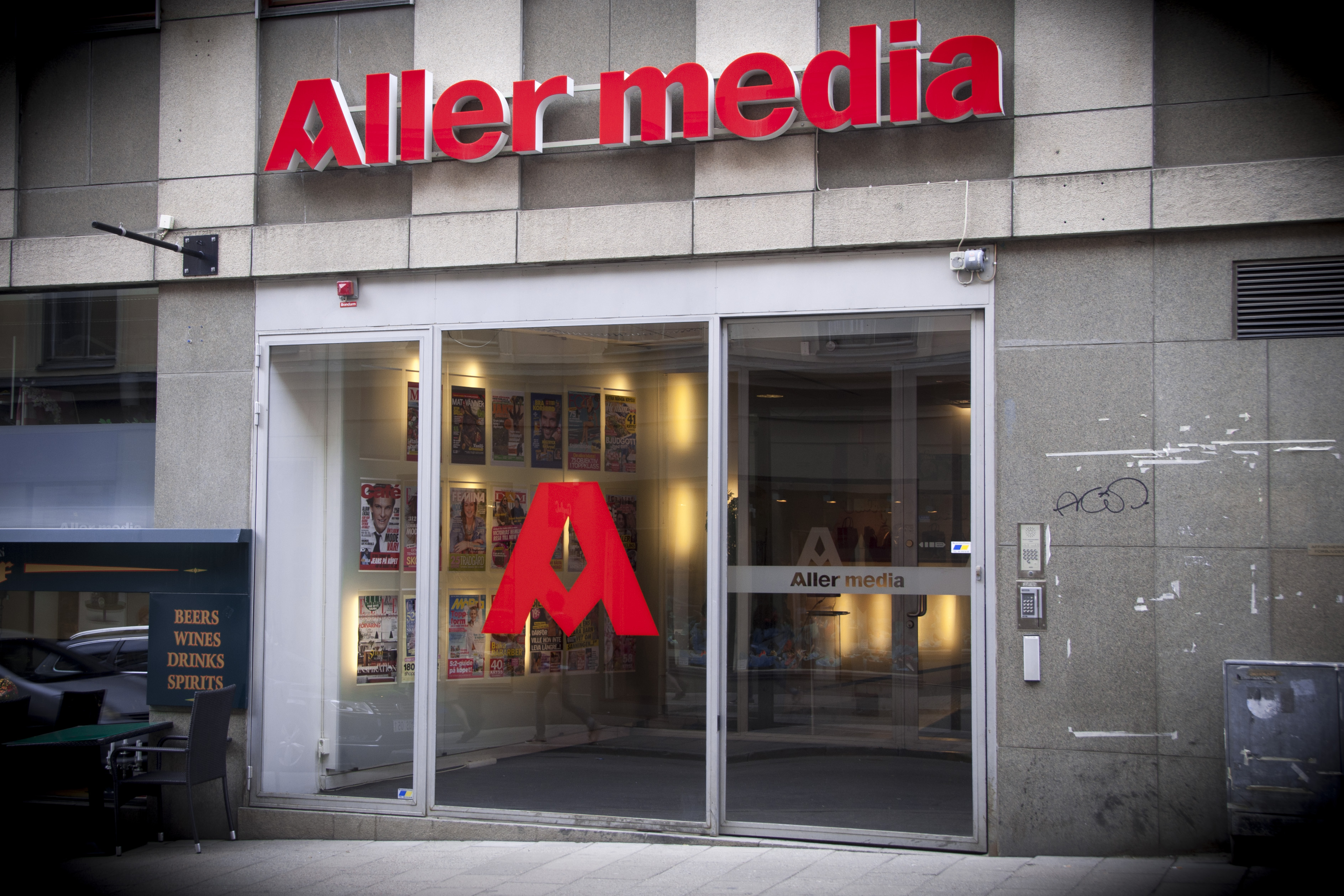 Aller medias Stockholmskontor på Humlegårdsgatan